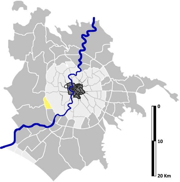 La Pisana